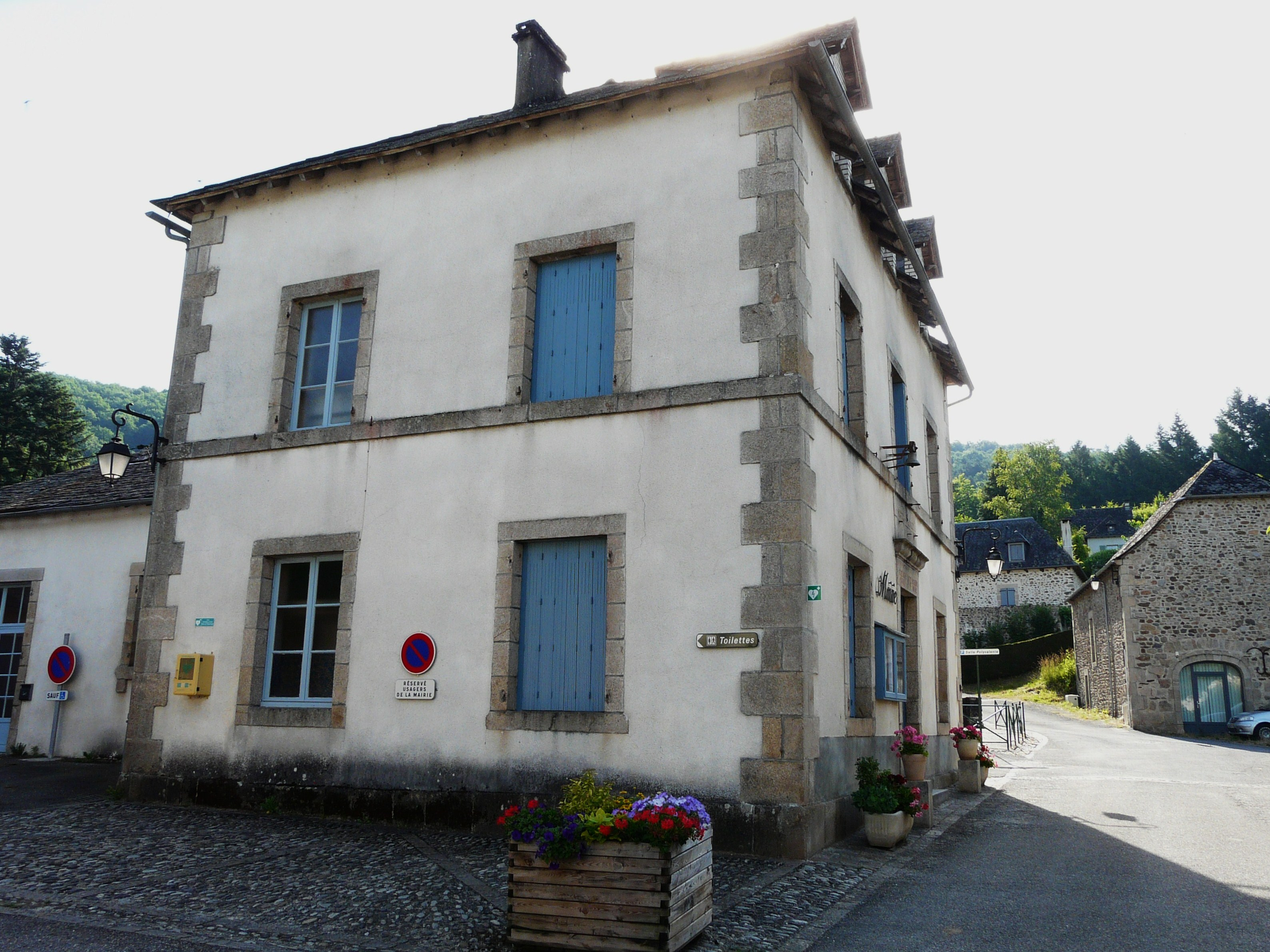 La mairie de Monceaux-sur-Dordogne, Corrèze, France.